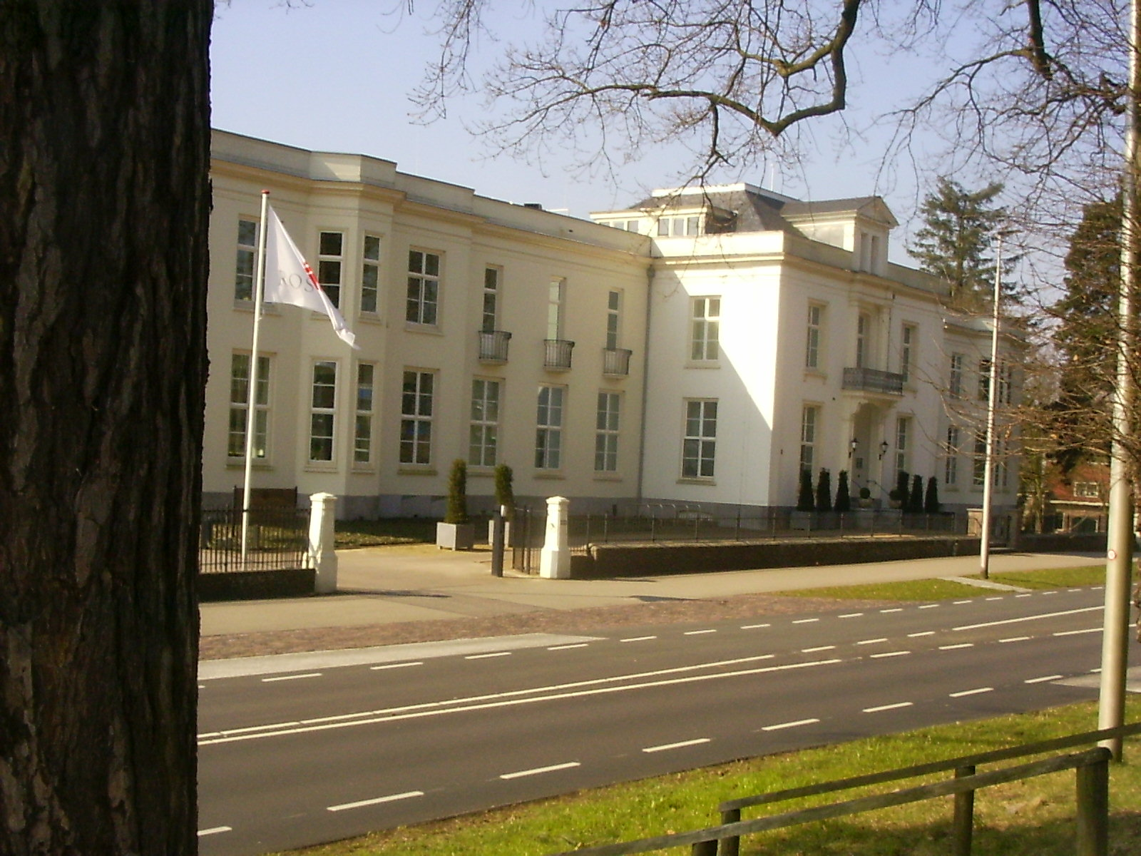 Arnhem, Amsterdamseweg 233, gemeentelijk monument